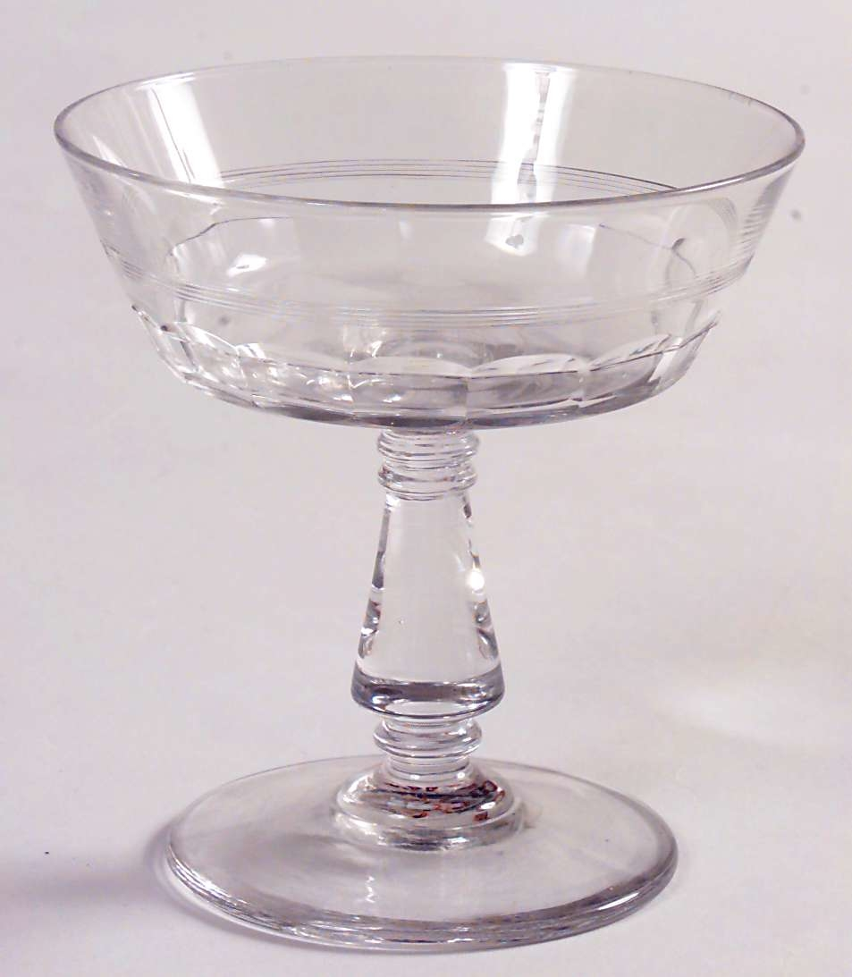 Champagneglass fra samlingene i Norsk Folkemuseum, høyde 9,8 cm, NF.1976-0354